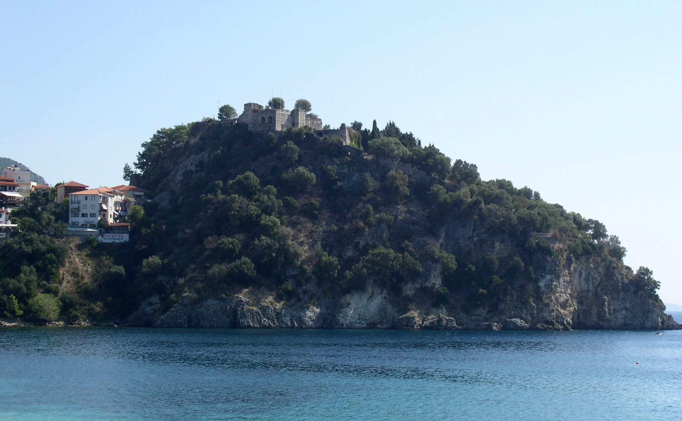 Festung in Parga (Griechenland)